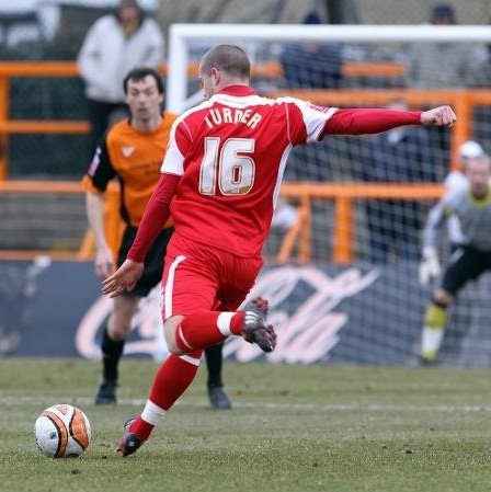 Asfc